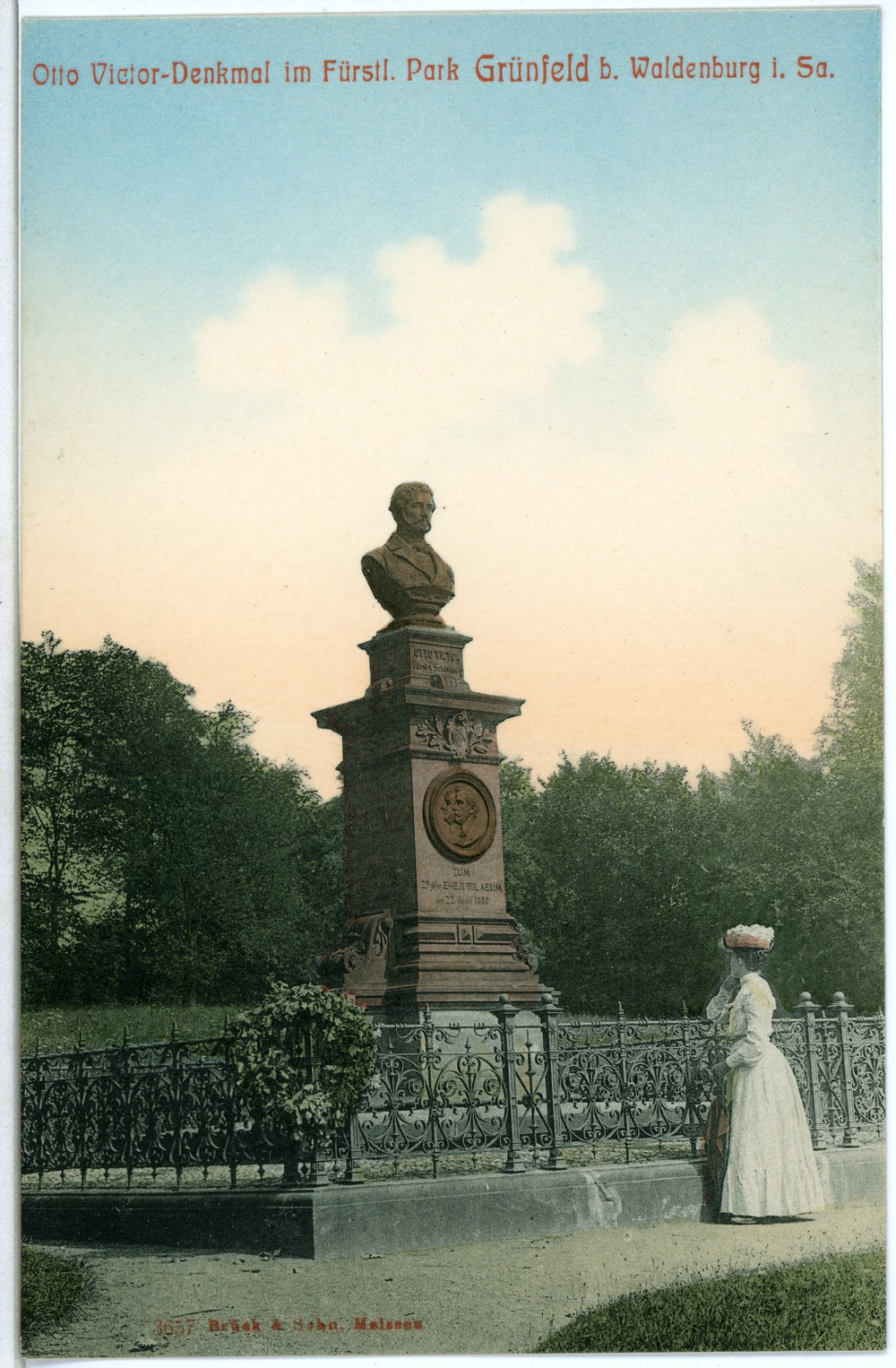 Waldenburg; Otto-Victor-Denkmal im fürstlichen Park Grünfeld This postcard is from publisher Brück & Sohn in Meißen ( postcard has a unique number 03657 and is available in a higher resolution at the publisher. This images was uploaded in a cooperation project between Wikipedians and the publisher.